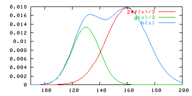 mélange de deux populations gaussiennes. Image personnelle créée avec Gnuplot. Domaine public.